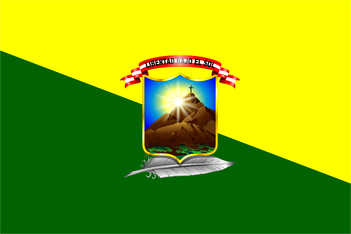 Distrito de Sayán - Provincia de Huaura - Región Lima